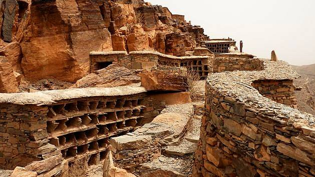 Marokko Amtoudi Agadir Id Aissa Bienenstöcke